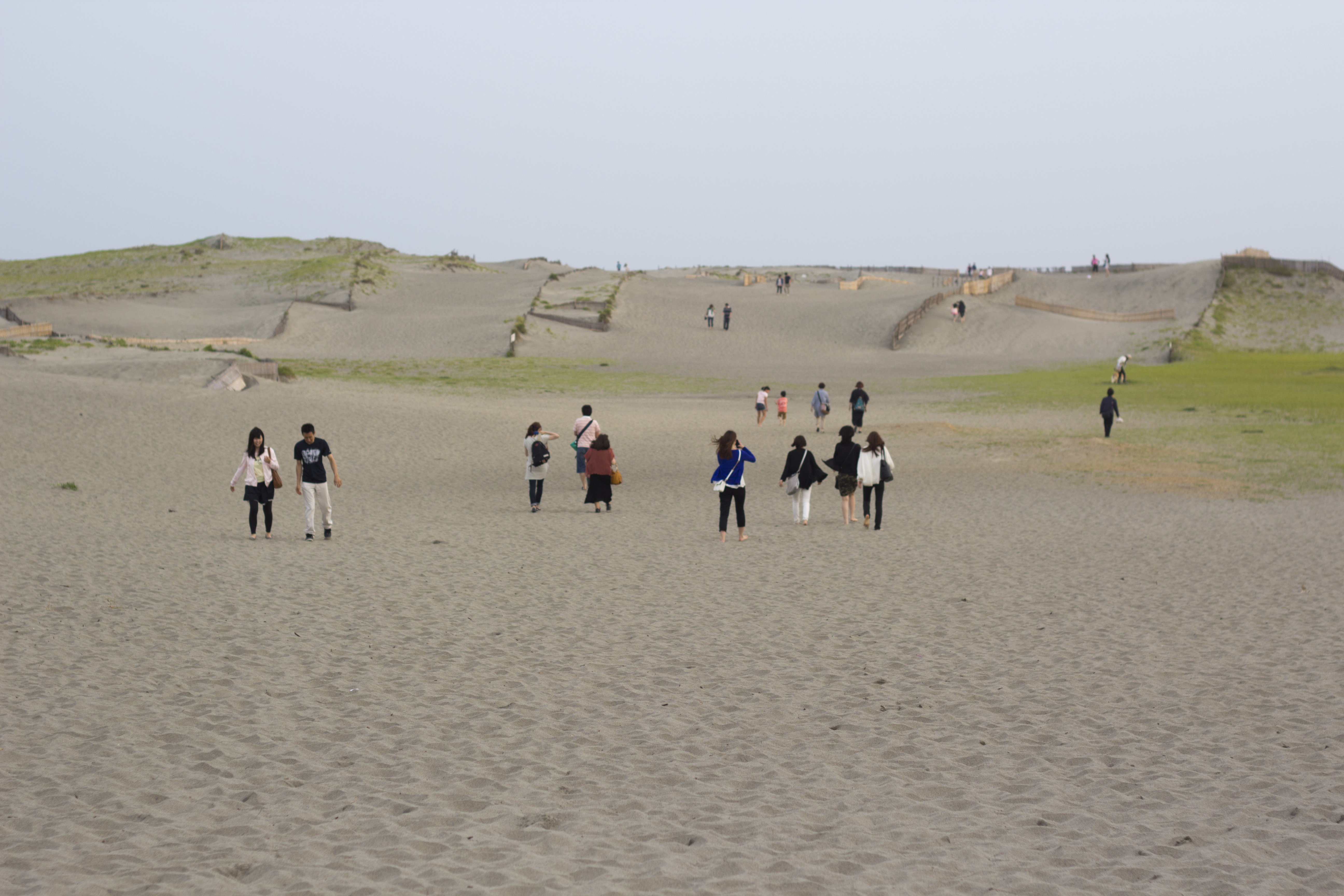 Nakatajima sand dunes, Hamamatsu, Shizuoka.